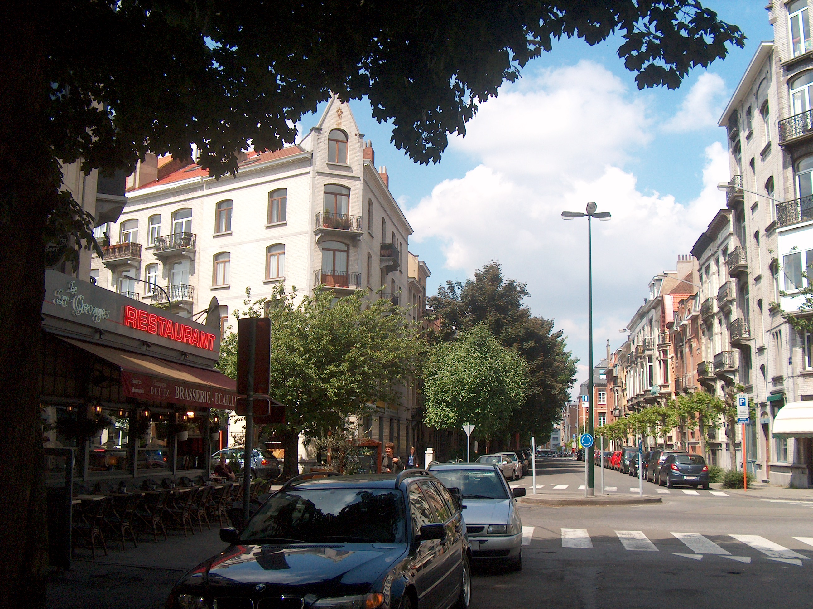 L'avenue Félix Marchal à Schaerbeek, Bruxelles, Belgique.